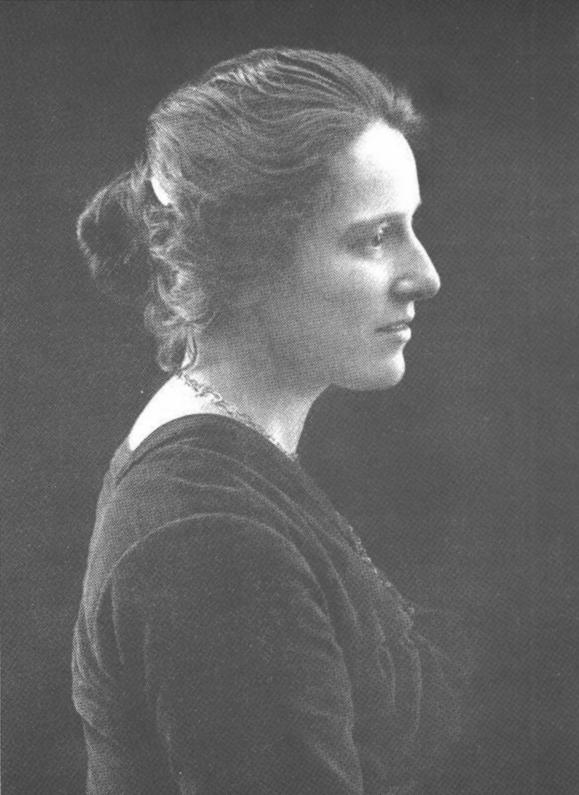 Fanny Moser (* 27. Mai 1872; † 24. Februar 1953), Schweizer Zoologin und Parapsychologin. Nicht zu verwechseln mit ihrer gleichnamigen Mutter (* 1848)